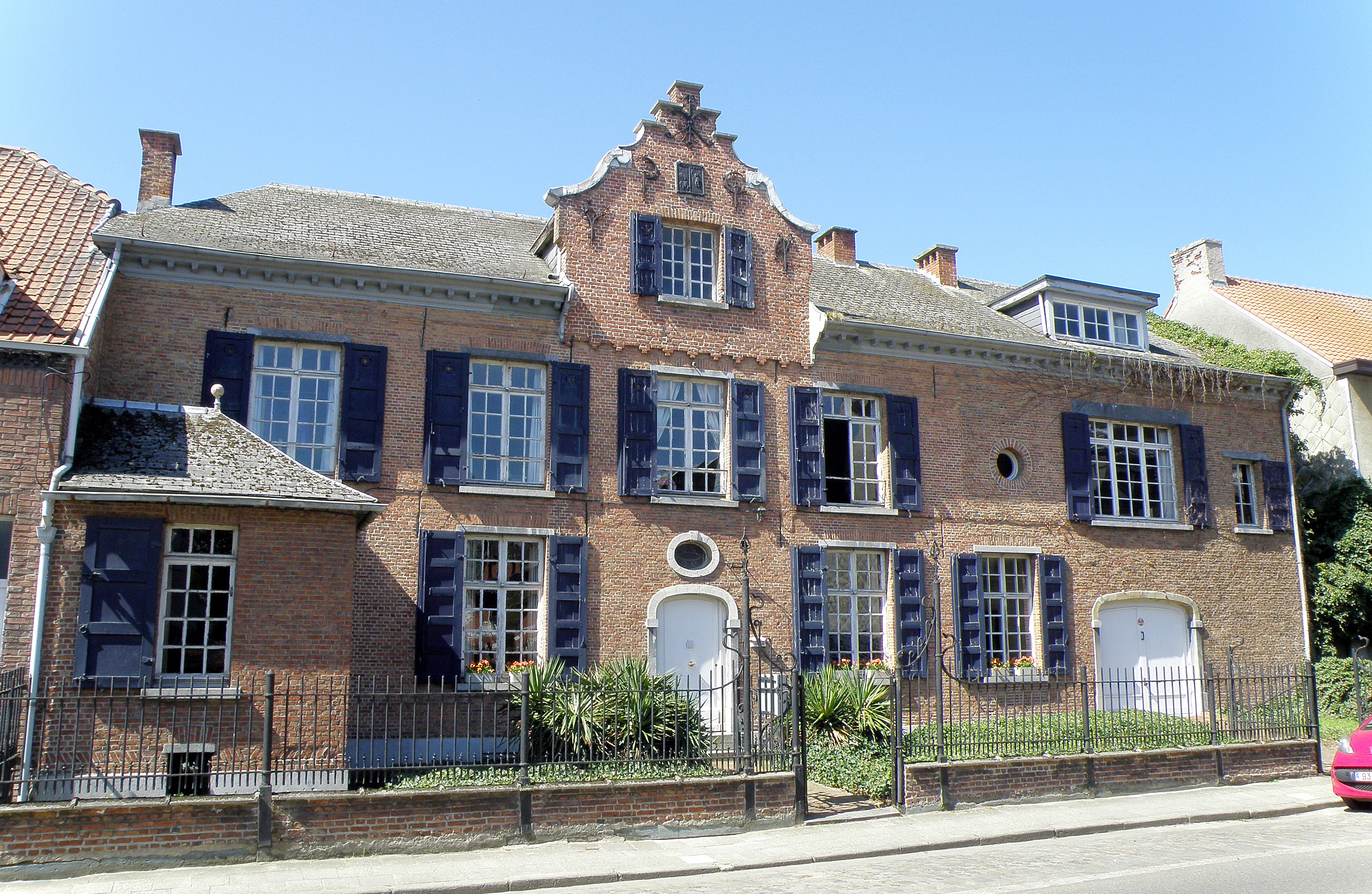 Antwerpen, district Ekeren. Huis de Grooff ofte Gulden Huys, woonhuis van architect Theofiel De Grooff, aan de Steenstraat nr. 51-53. Oorspronk. herenhuis wsch. uit 19de eeuw, verbouwd (d.i. aanbrengen van centrale topgevel) door De Grooff in 1910. Bemerk muurankers D en G (De Grooff) in centrale geveltop. Vgl. verder Inventaris Bouwkundig Erfgoed.